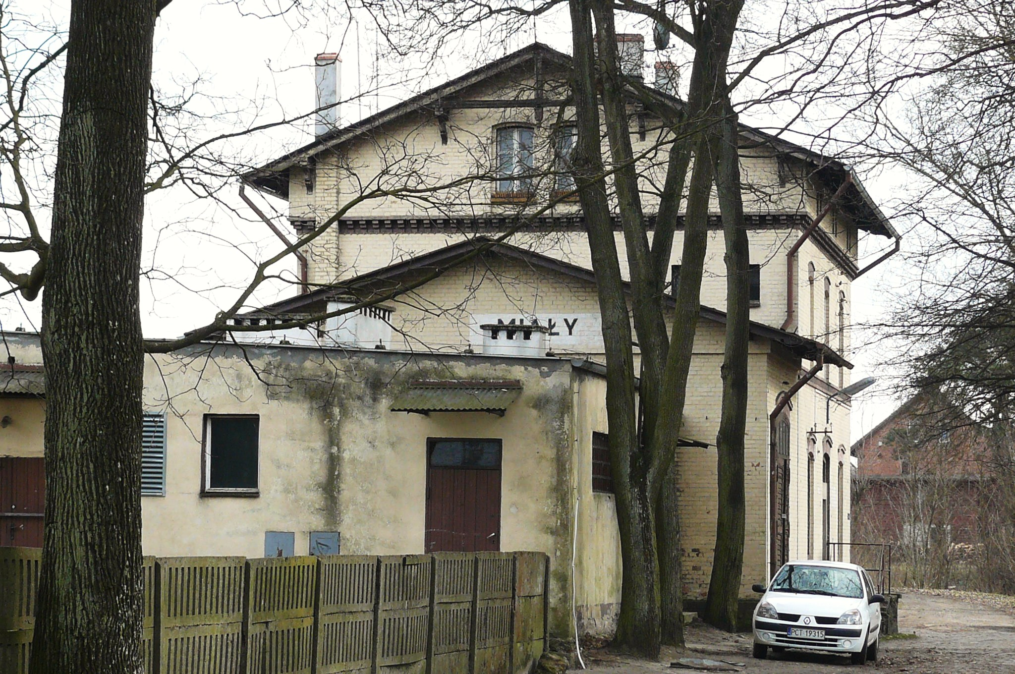 Dworzec w Miałach.